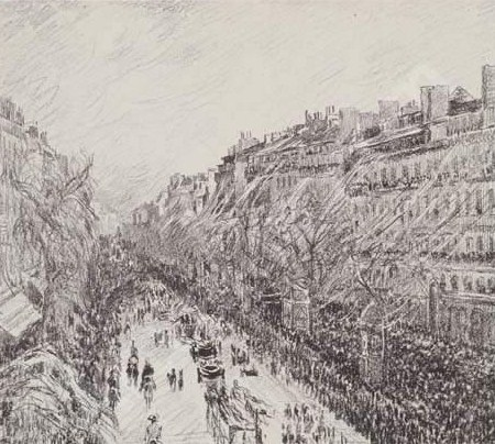 La mi-carême à Paris. Reprend le sujet d'un tableau de Pissaro peint en 1897.